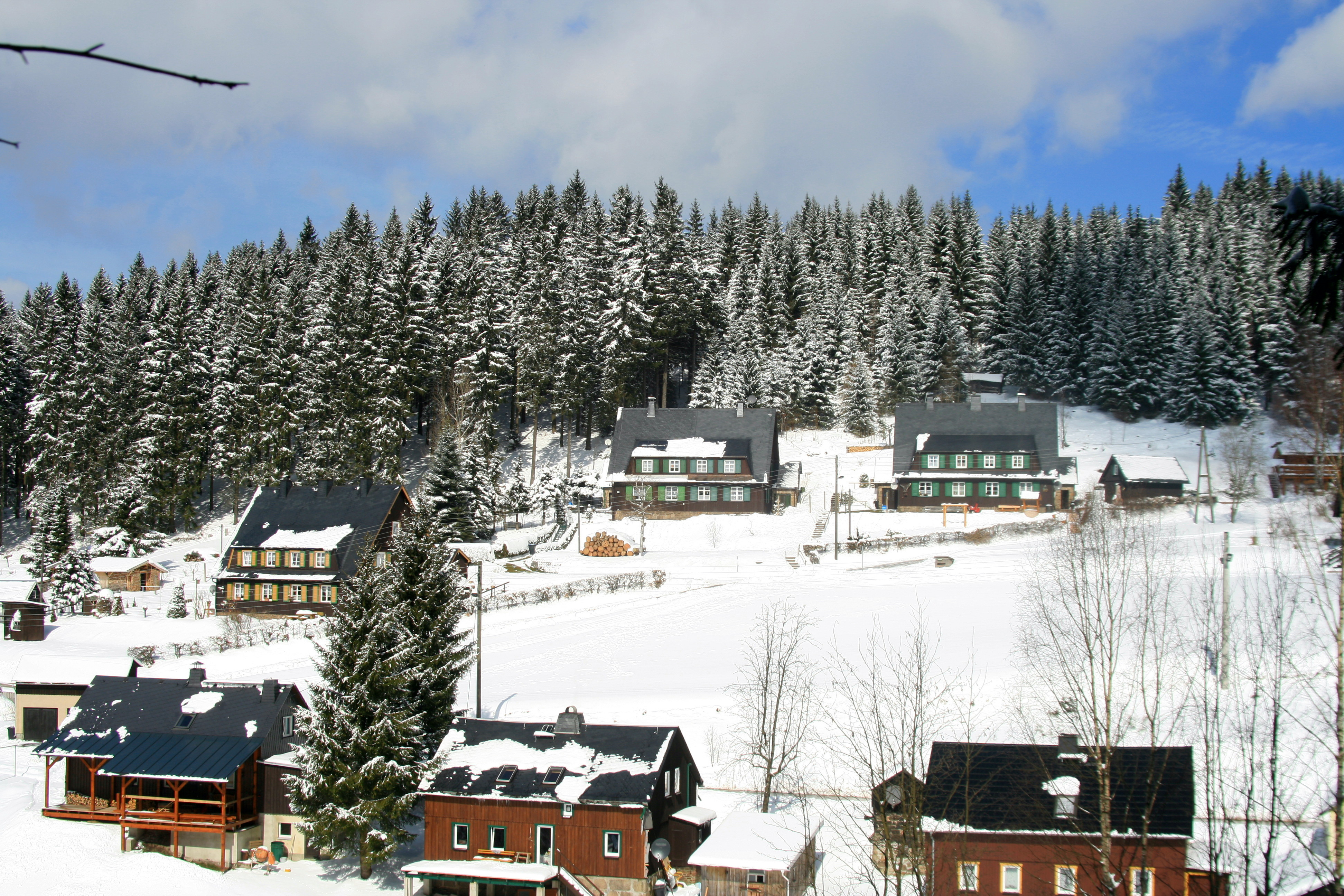 Waldweiler Sachsengrund im Winter